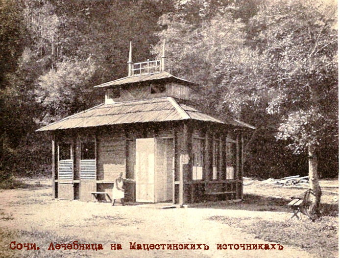 Первое ванное здание